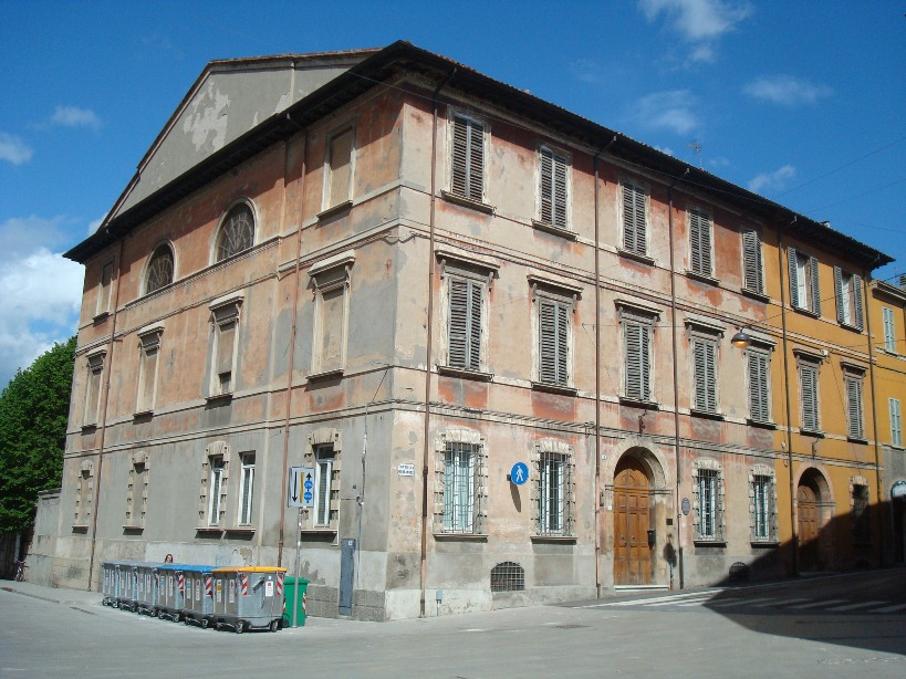 Cesena (Italie), le palazzo Mazzoli-Ghini